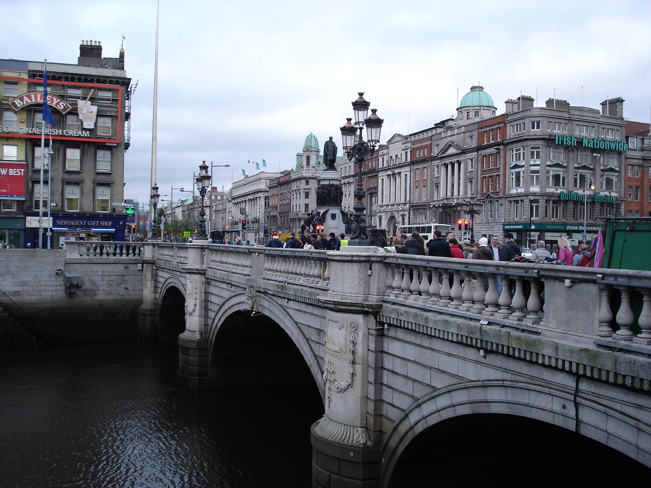 O'Connel Bridge, Dublin. Foto: Ferale, desember 2005